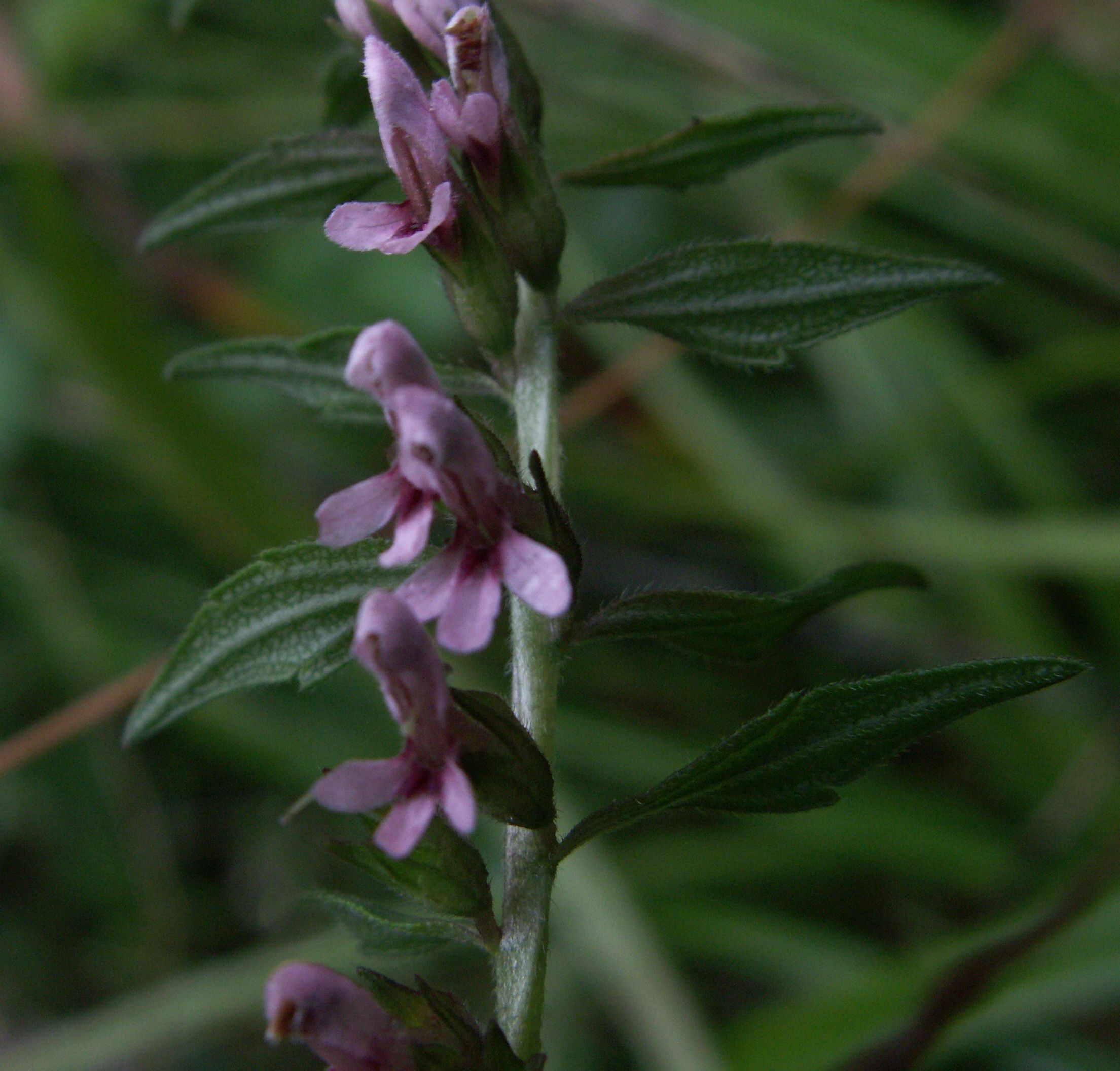 Odontites vulgaris